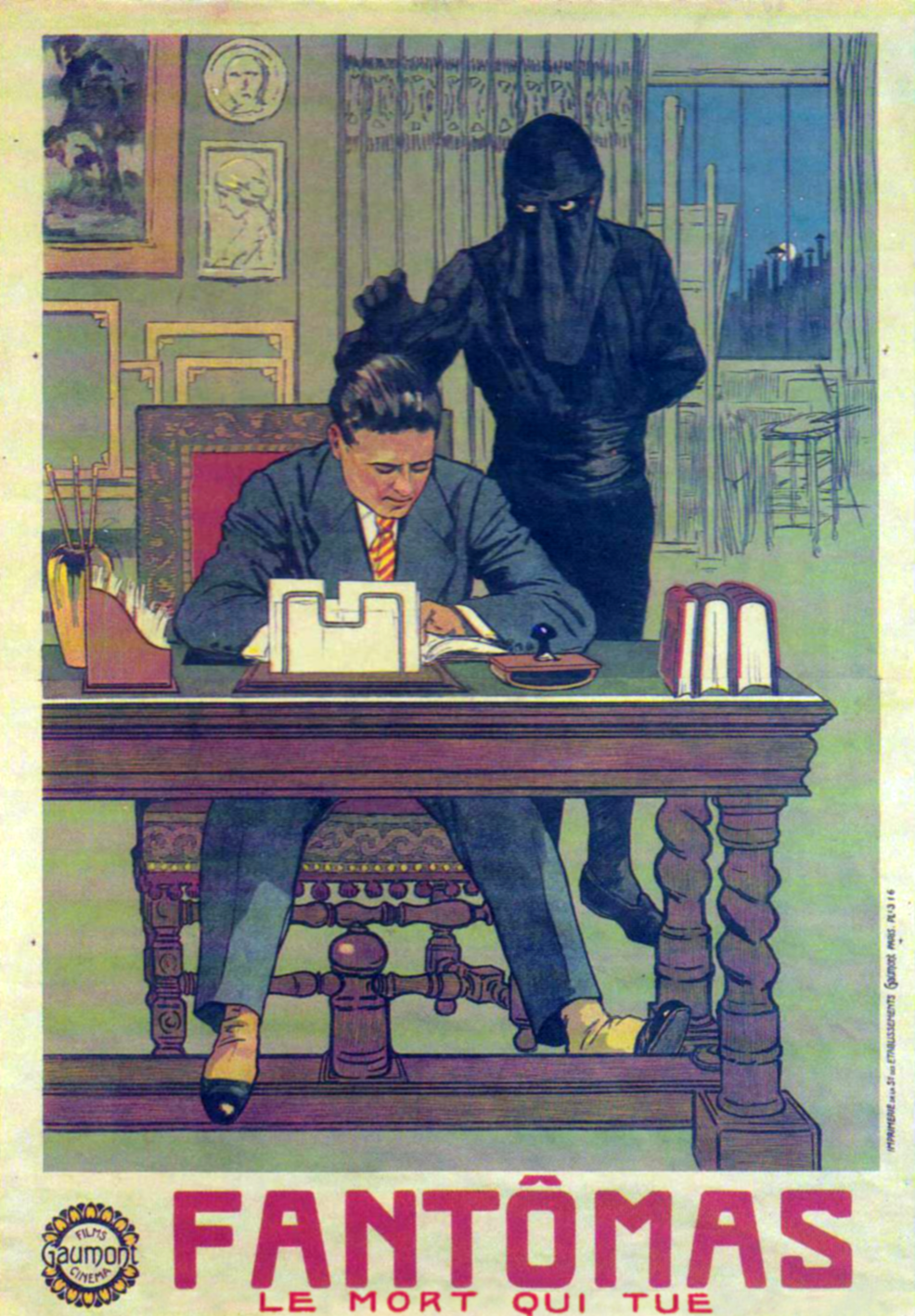 Carte postale éditée par Gaumont et reprenant l'affiche de Le Mort qui tue (1913), troisième film adapté de la saga Fantômas par Louis Feuillade d'après le roman éponyme de Pierre Souvestre & Marcel Allain.